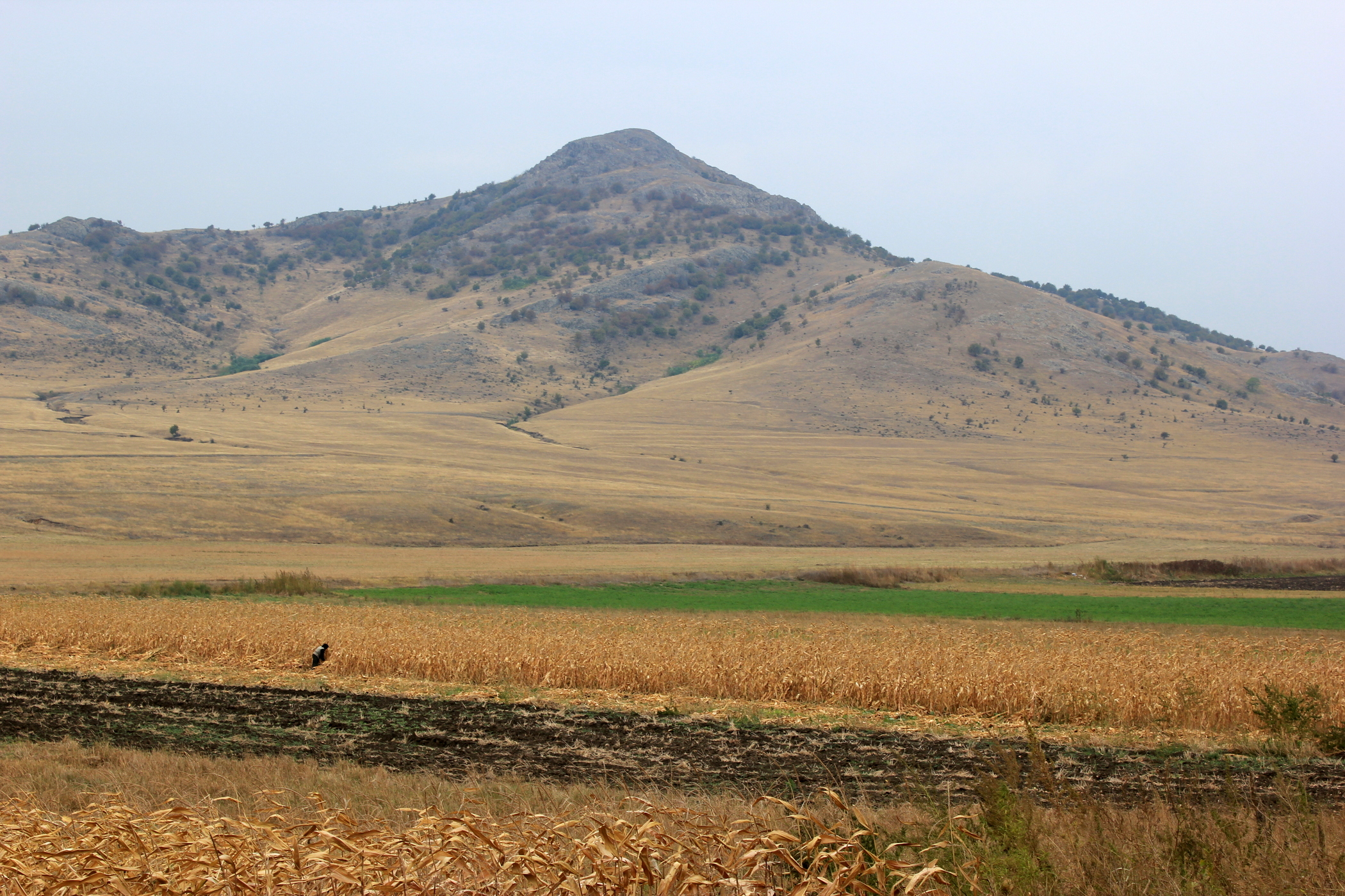 Landschaft bei Iulia, Kreis Tulcea, Rumänien.